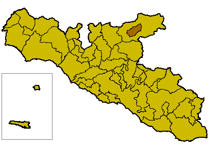 Locatie van San Giovanni Gemini